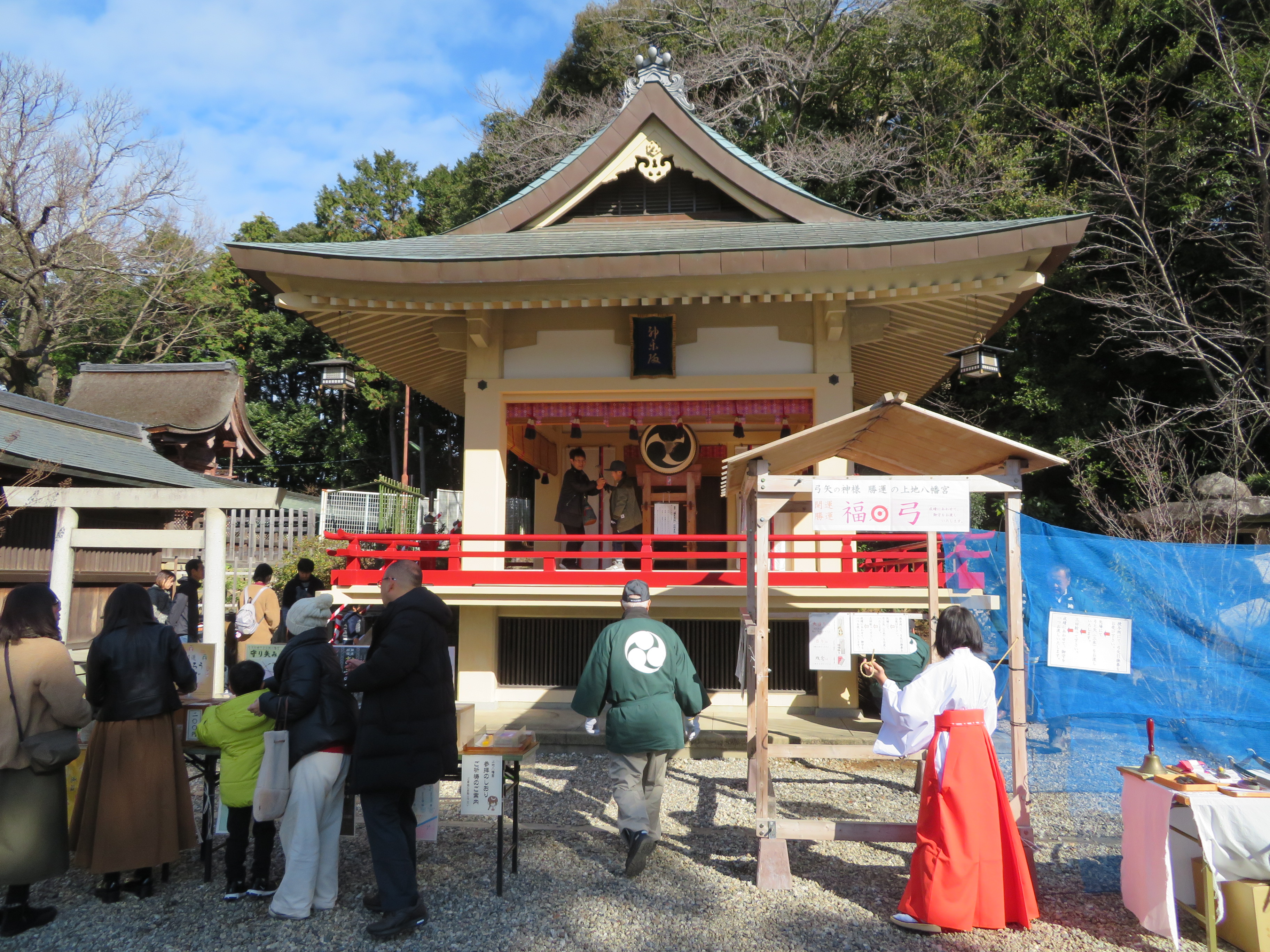 上地八幡宮（岡崎市上地町）